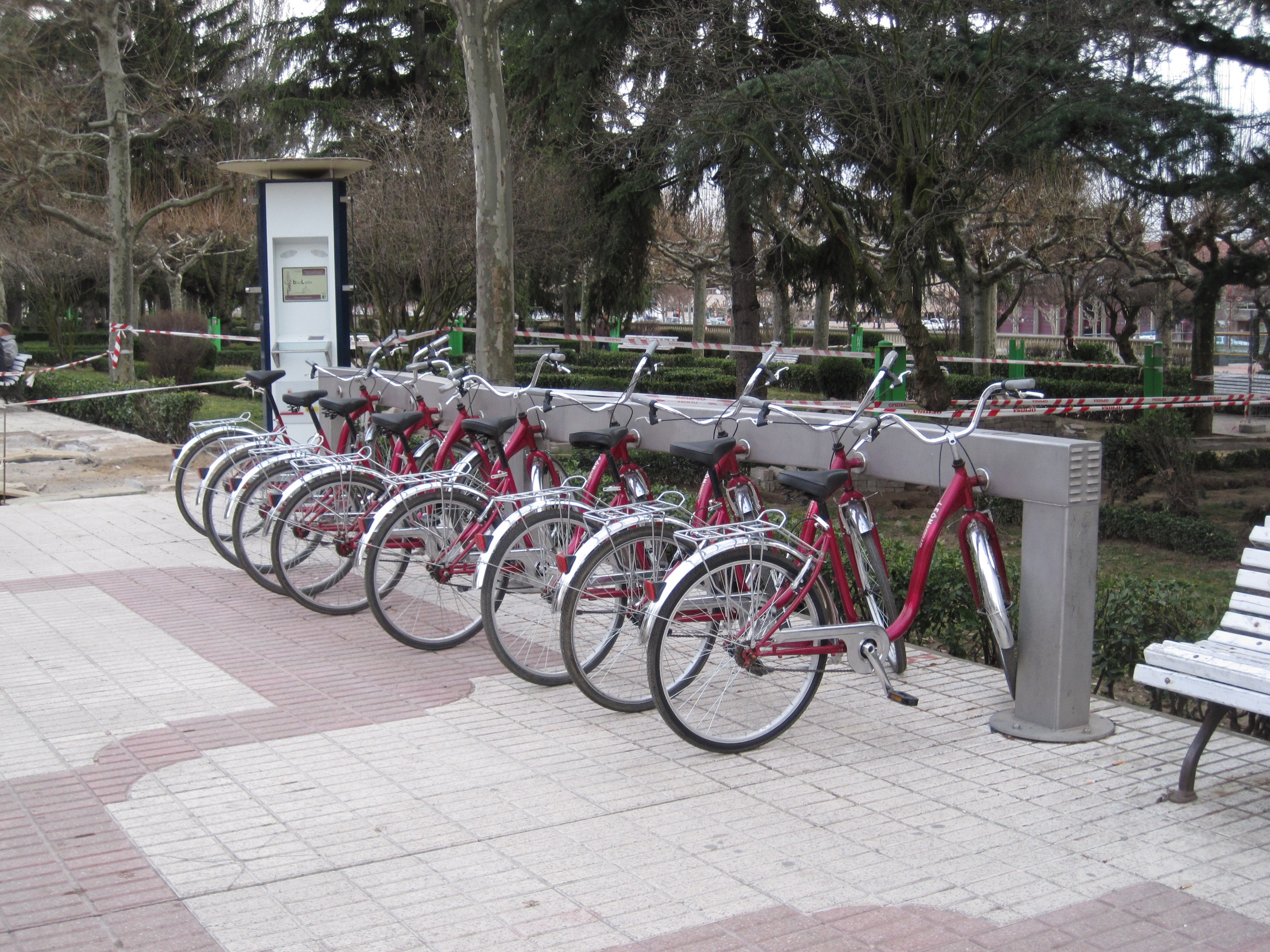 Uno de los aparcamientos del servicio de préstamo de bicicletas de la ciudad de León (España).